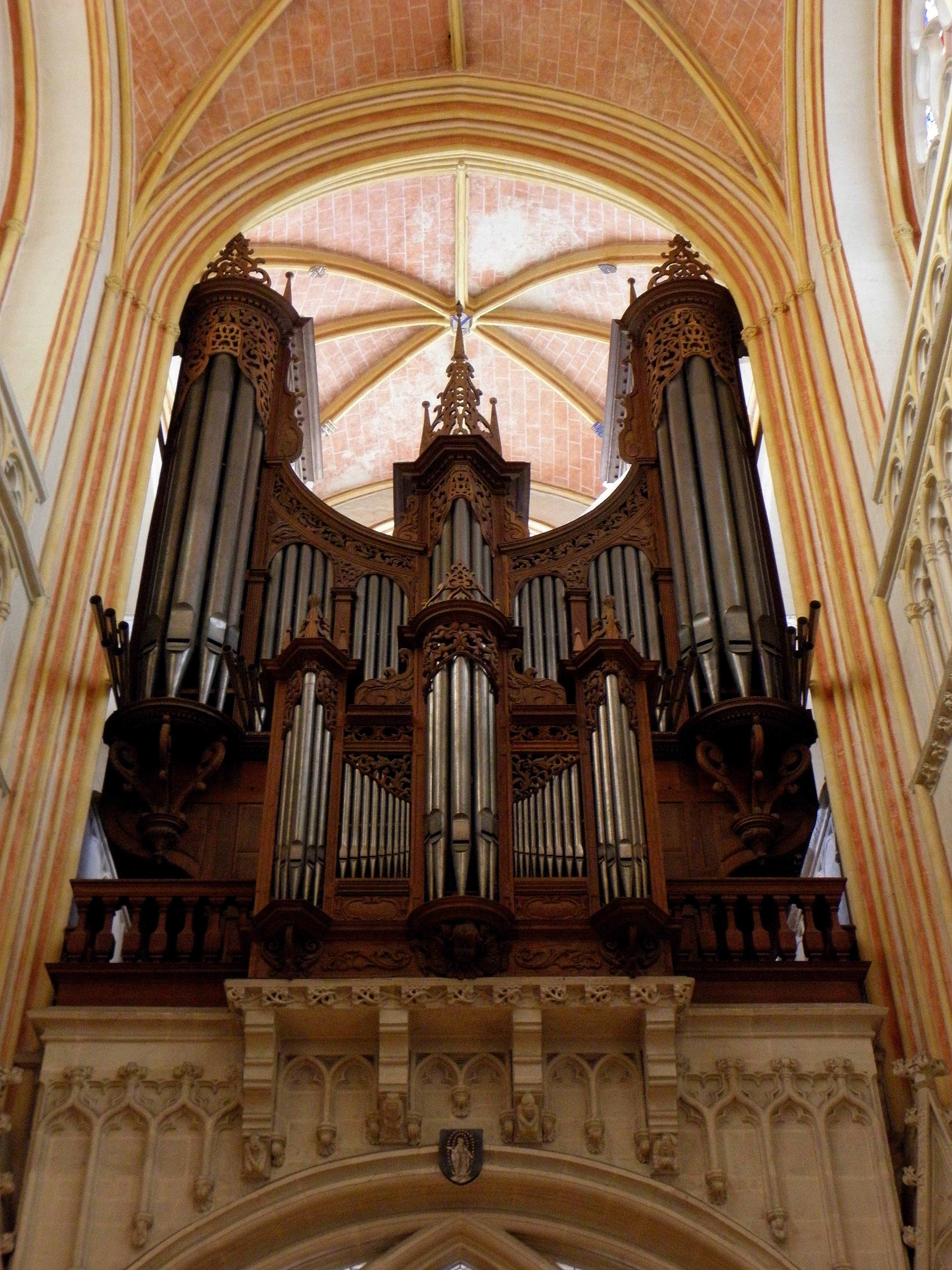 Grandes Orgues de la Cathédrale Saint-Corentin de Quimper (29).